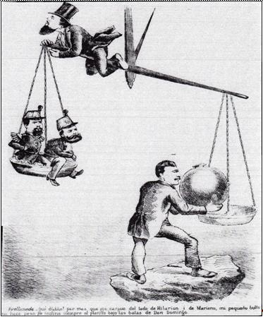 Caricaturas chilenas de la Guerra del Pacífico - Patricio Ibarra Cifuentes: "A través de esta caricatura dada a la luz el 22 de noviembre de 1879, El Barbero denuncia la intervención a favor de Perú y Bolivia por parte de la república Argentina. El presidente Nicolás Avellaneda sujetándose en el lado de la balanza donde se encuentran los aliados (Hilarión Daza y Mariano Ignacio Prado), lamenta que pese a sus intentos por favorecerles, no es suficiente para revertir la situación a su favor debido al peso impuesto por las balas del ministro Domingo Santa María. La figura del jefe de gabinete es colocada por sobre la de otros personajes chilenos civiles importantes de la Guerra del Pacífico, tales como el propio presidente Aníbal Pinto o el ministro Rafael Sotomayor."